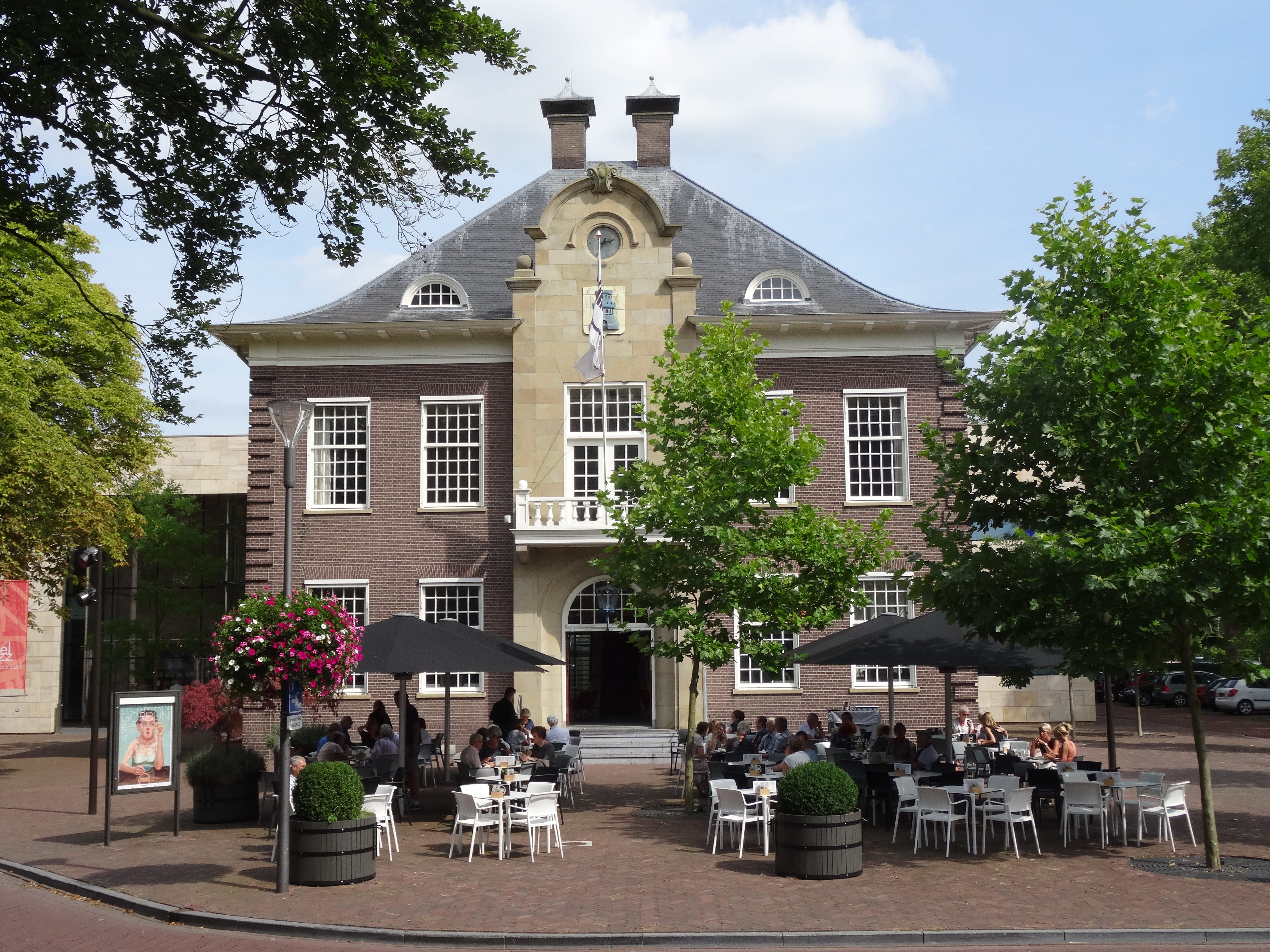 Museum MORE Gorssel